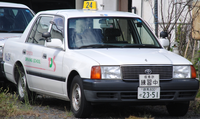 トヨタドライビングスクール群馬の教習車。秋の交通安全フェスティバルにて撮影。